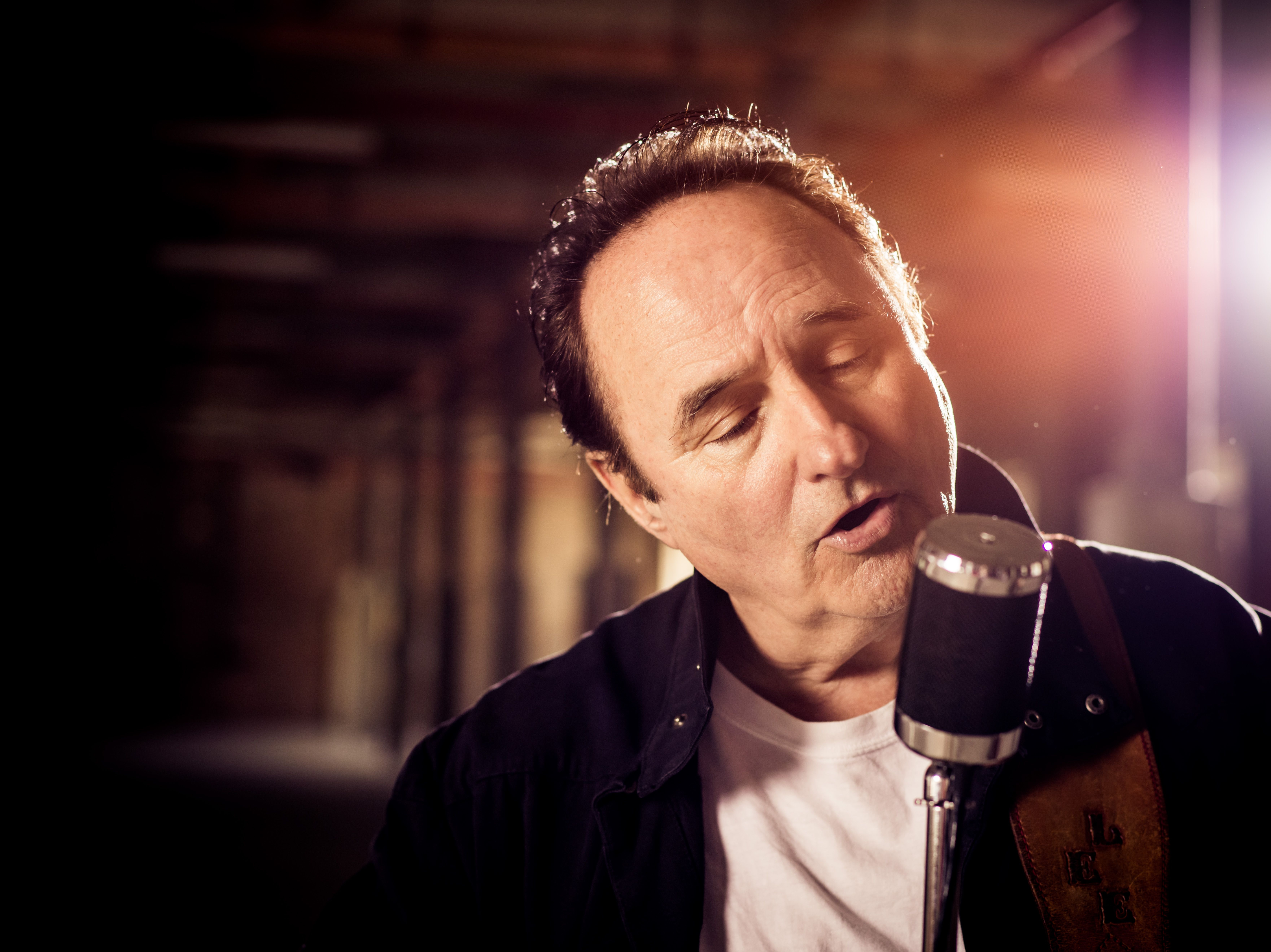 Lonnie Lee